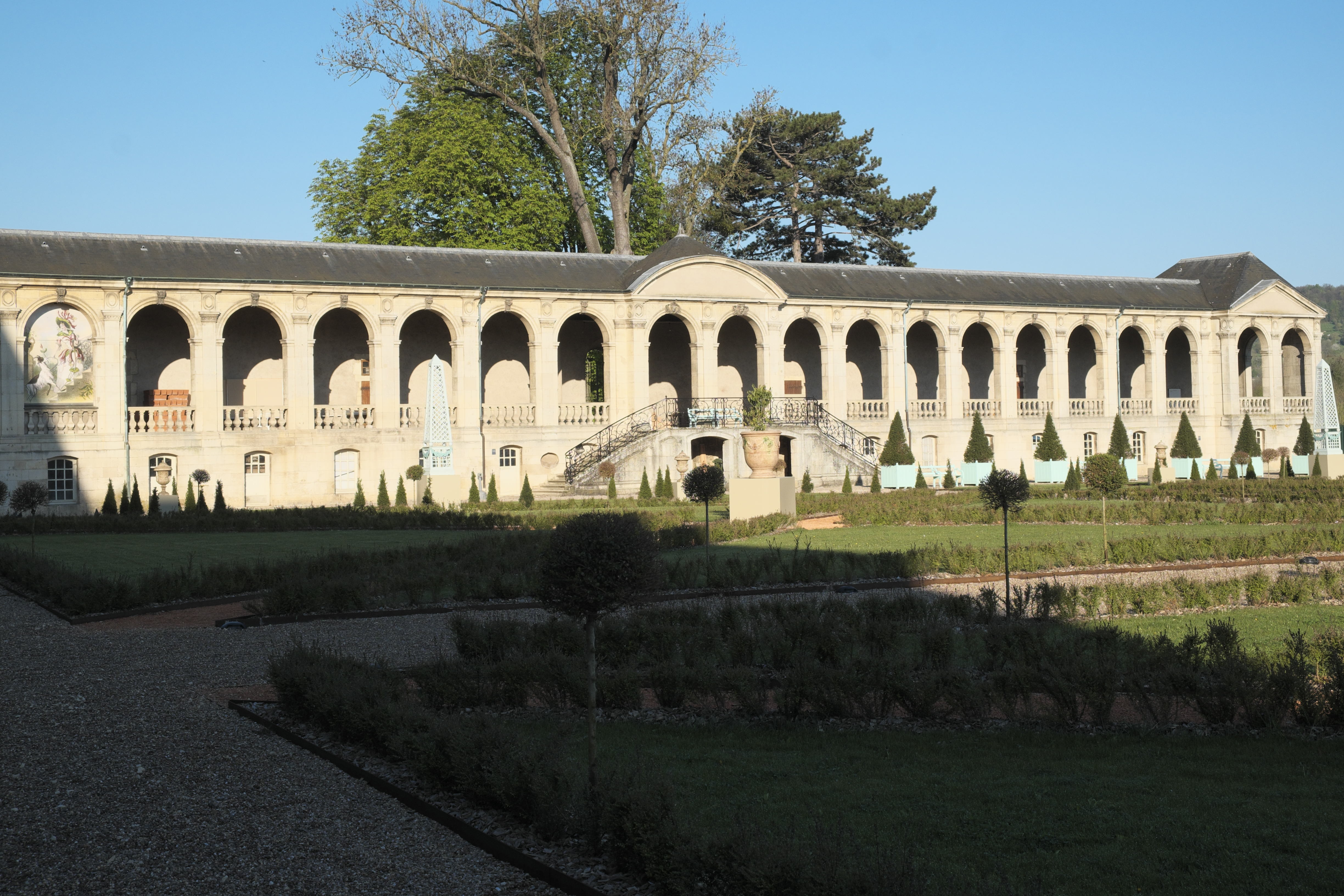 Ehemalige Prämonstratenserabtei in Pont-à-Mousson im Département Meurthe-et-Moselle (Region Grand Est/Frankreich)